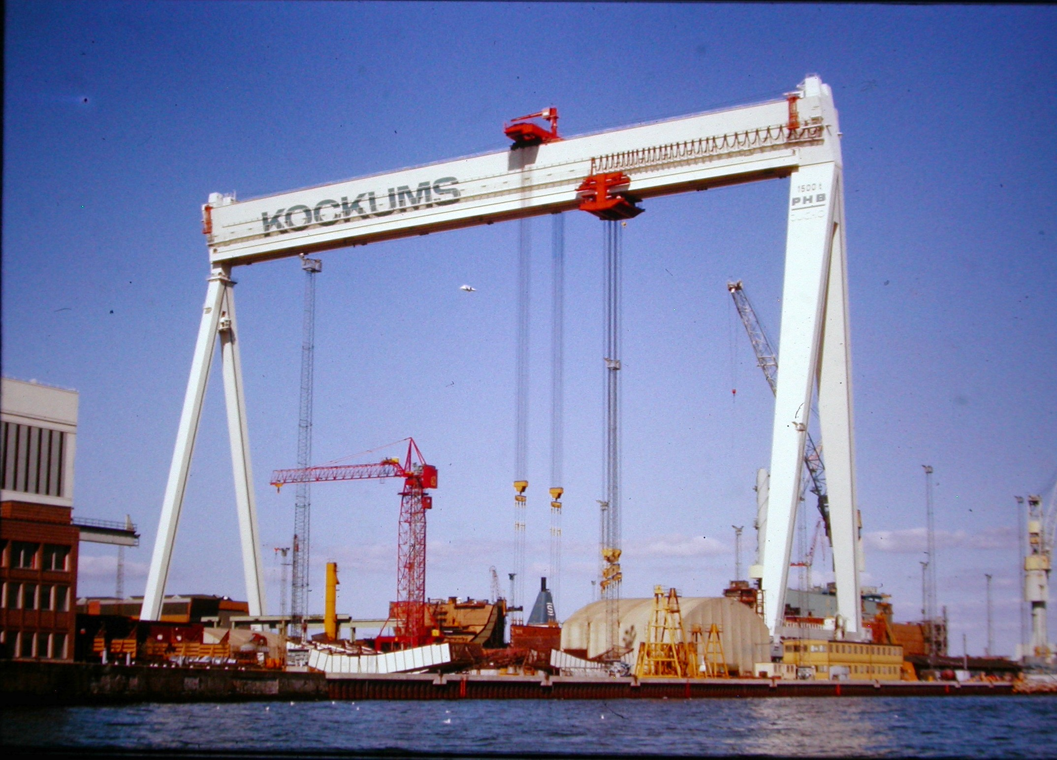 Kran der Tränen am Hafen von Malmö - später abgebaut und nach Korea verkauft